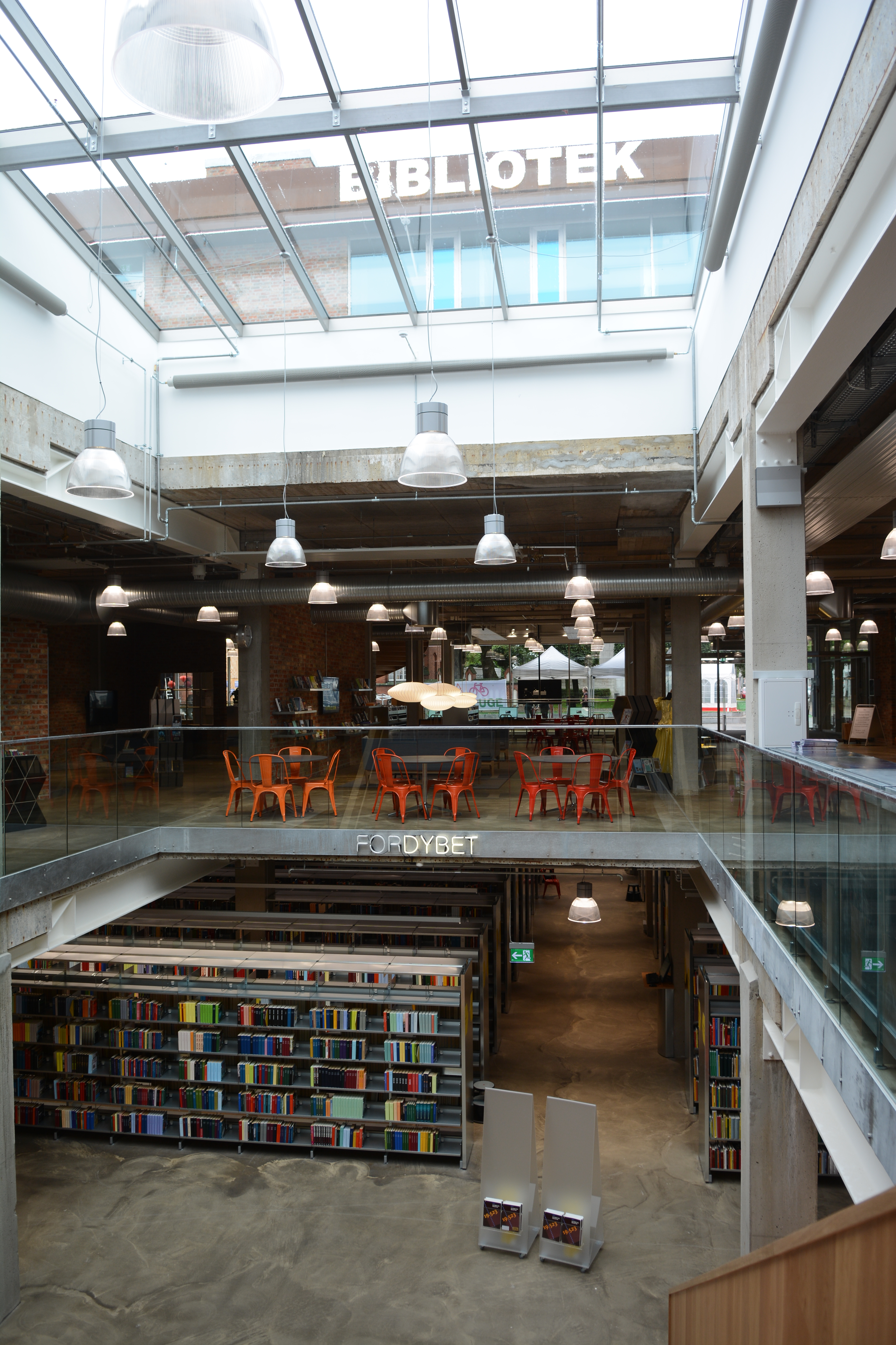 Dybet, Gadeplan og med kig til øverste etage med kontorer